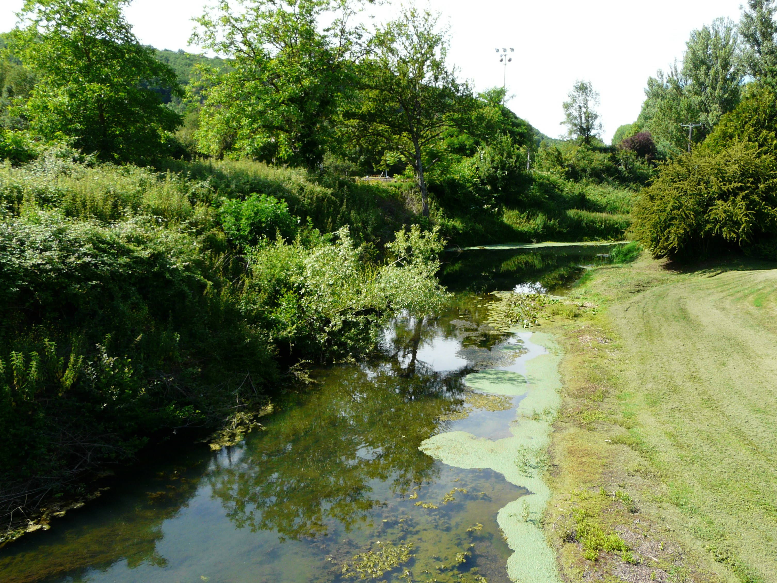 La Tourmente en amont du pont de la route départementale 803, Saint-Denis-lès-Martel, Lot, France.